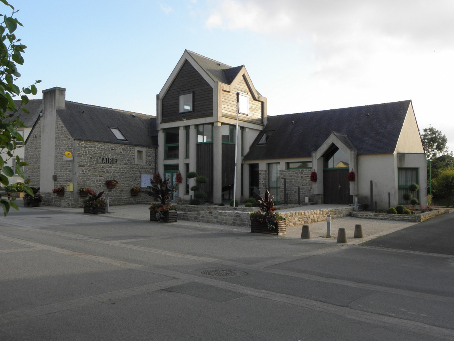 Mairie de Sibiril (29).